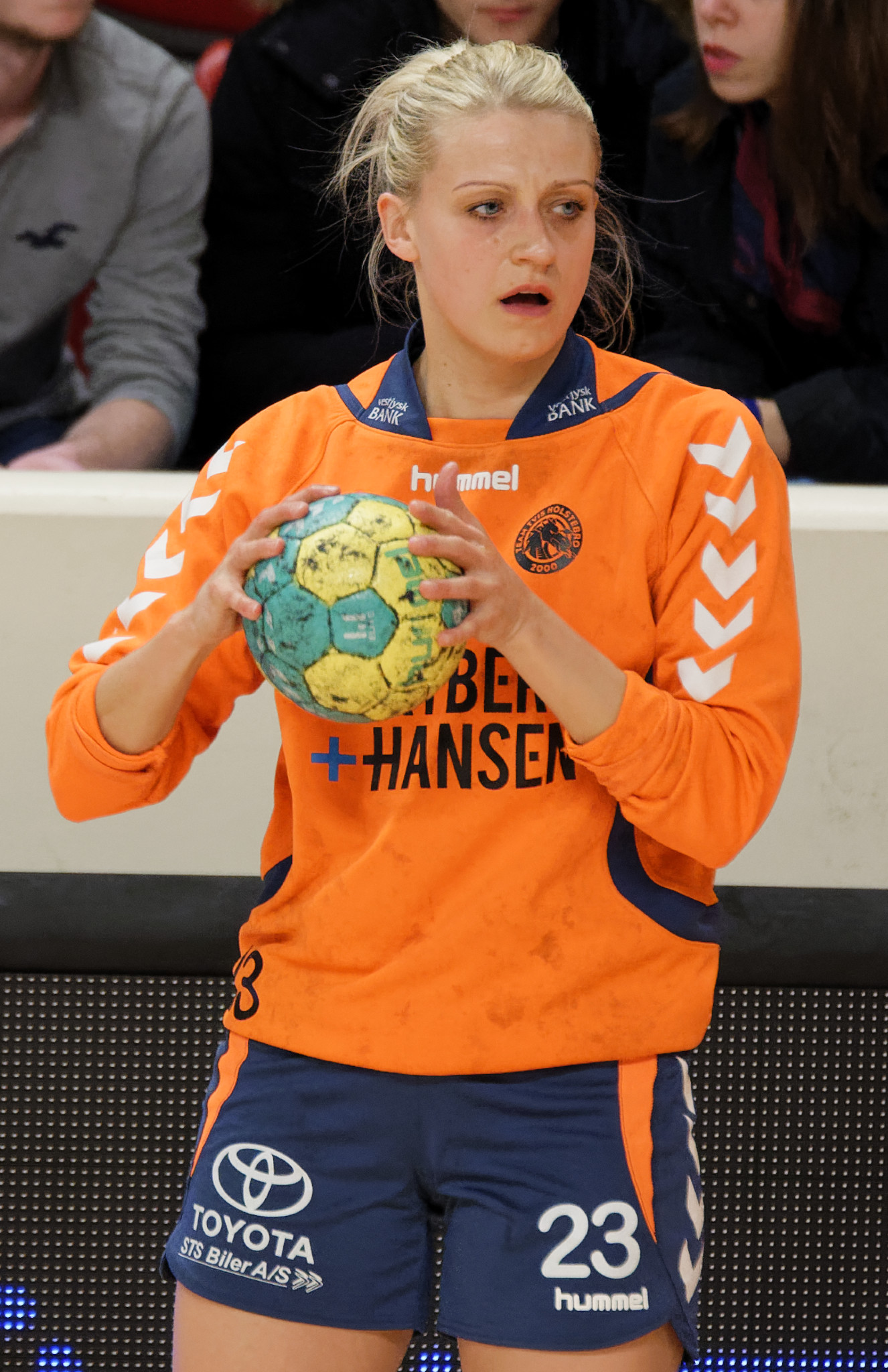 Rencontre de Coupe EHF entre Issy Paris Hand et les danoises de Team Tvis Holstebro. A Coubertin, le 13 mars 2015.